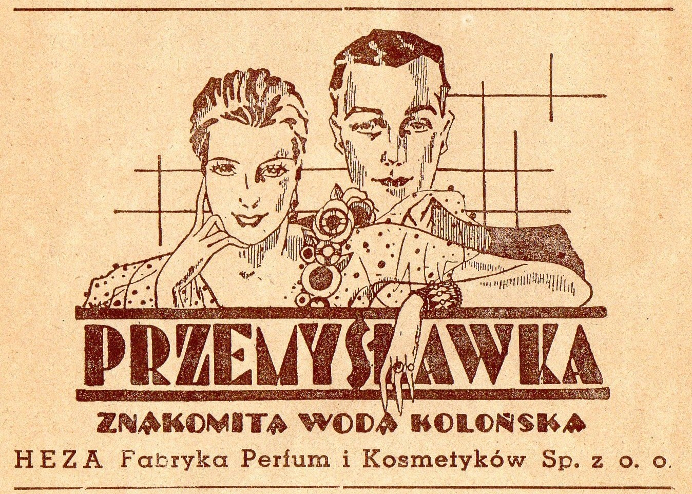 Reklama wody kolońskiej Przemysławka z 1947.